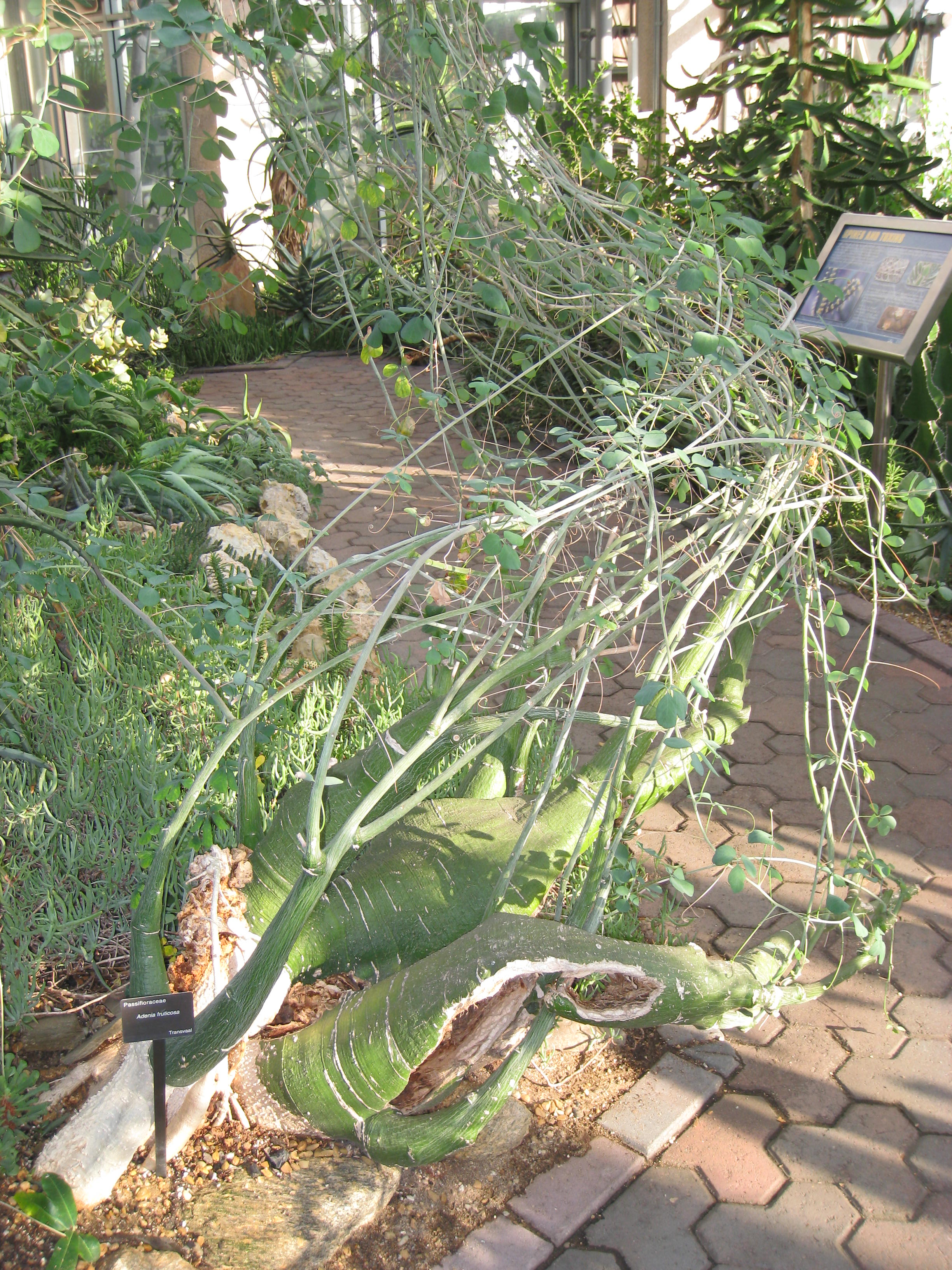 Adenia fruticosa. Specimen in the Atlanta Botanical Garden, Atlanta, Georgia, USA.